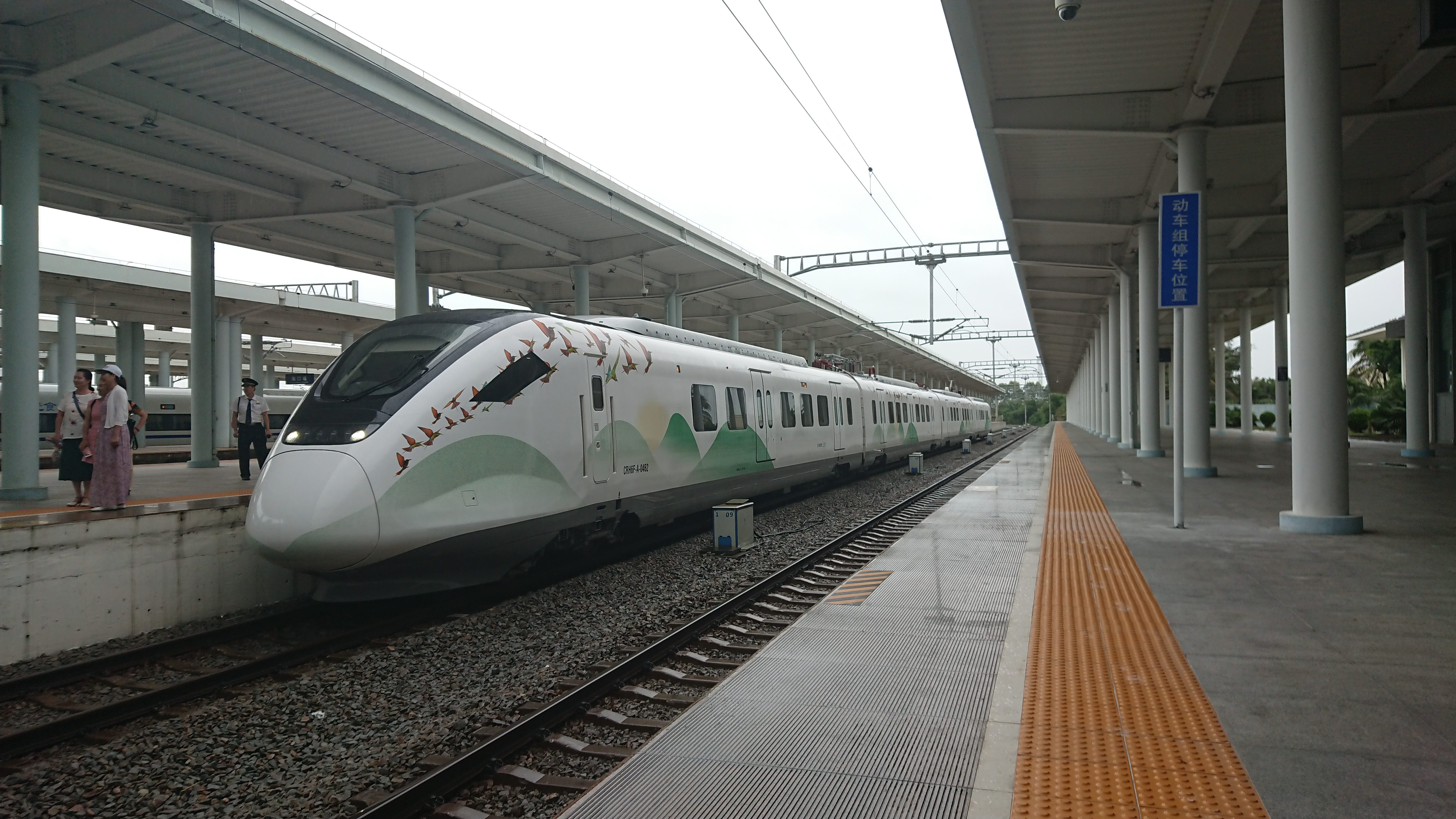 中文（中国大陆）: 海口市郊列车使用的CRH6F-A停靠在海口站